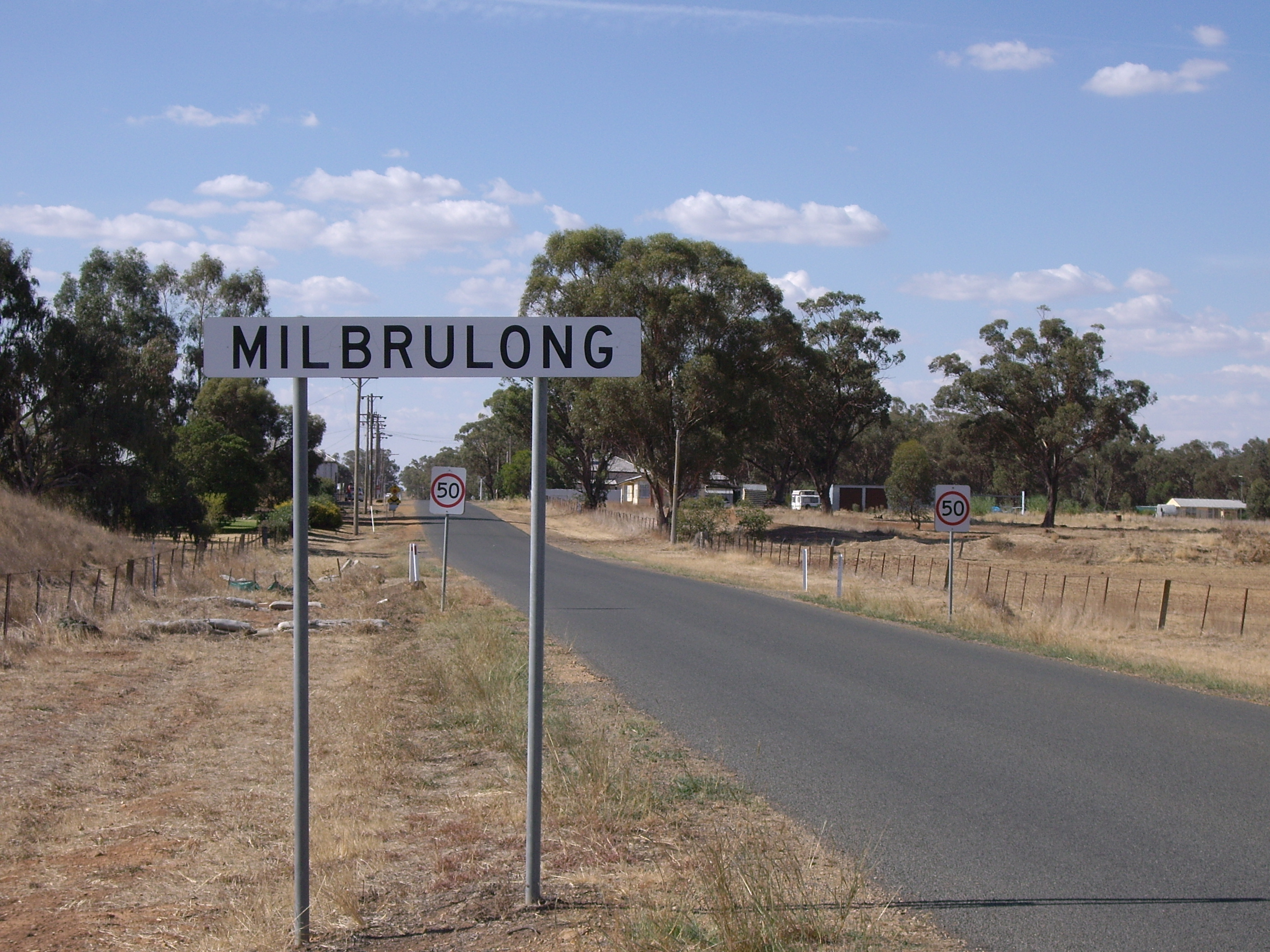 Entering Milbrulong